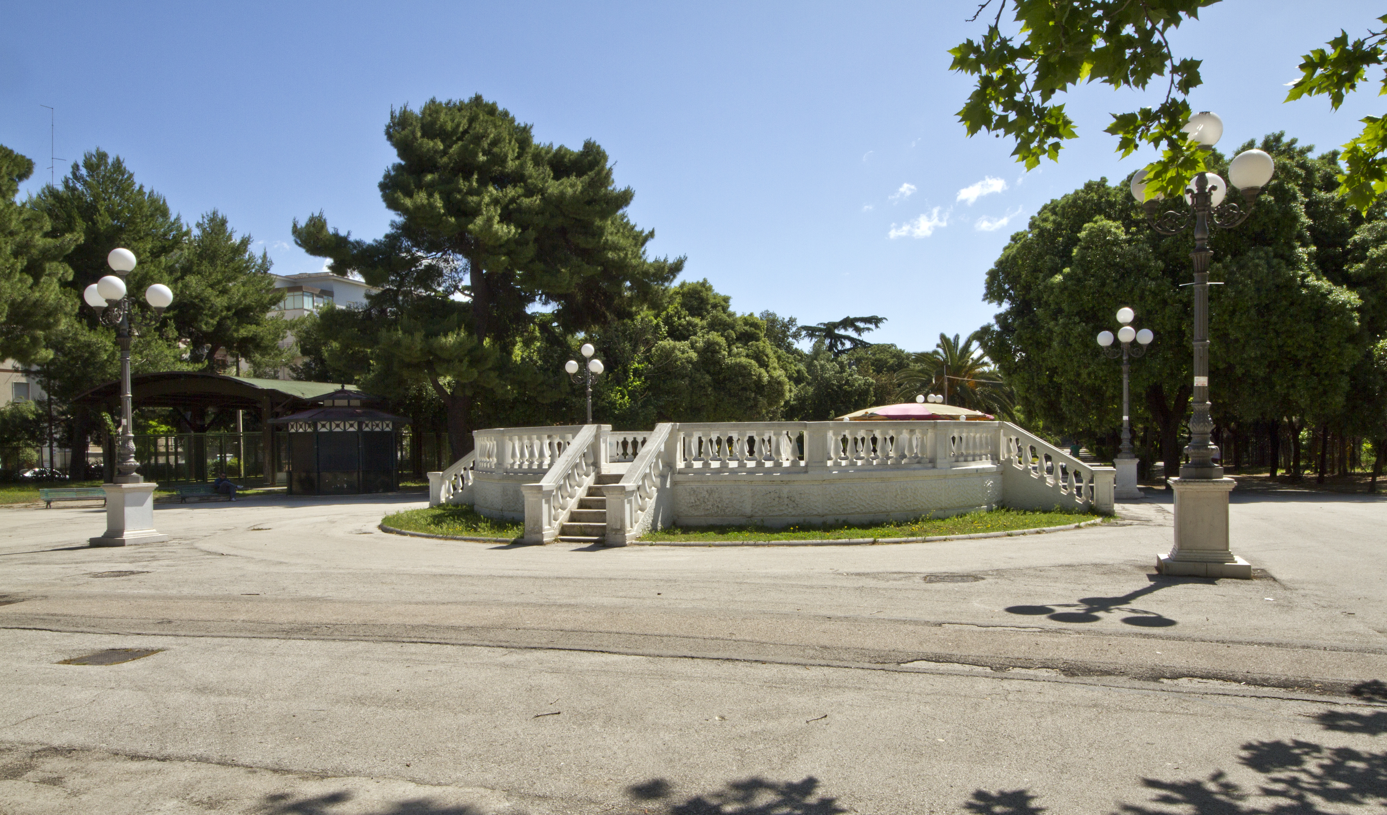 Foggia, Province of Foggia, Italy